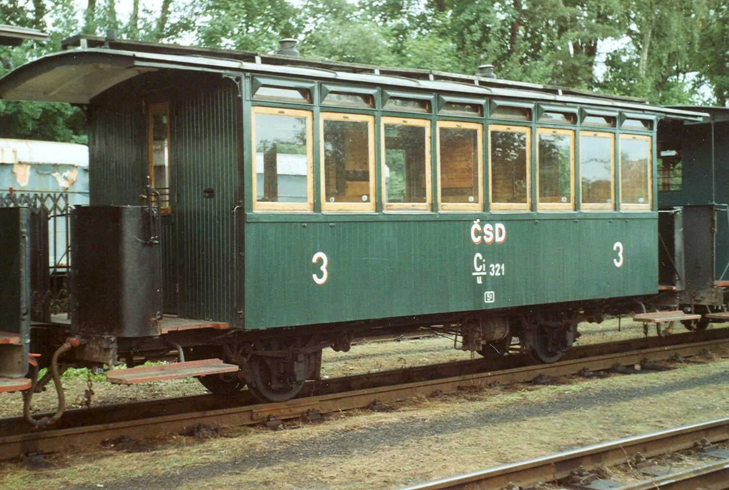 Holzbeplankter größerer Wagen des Museumszuges (JHMD in Jindřichův Hradec).